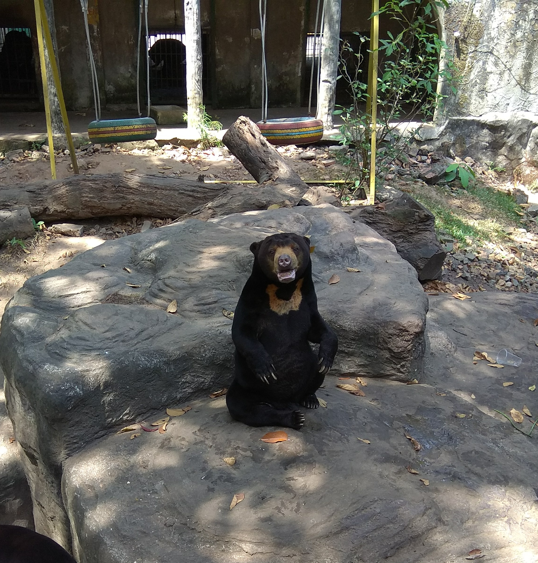 越南西貢動物園的馬來熊